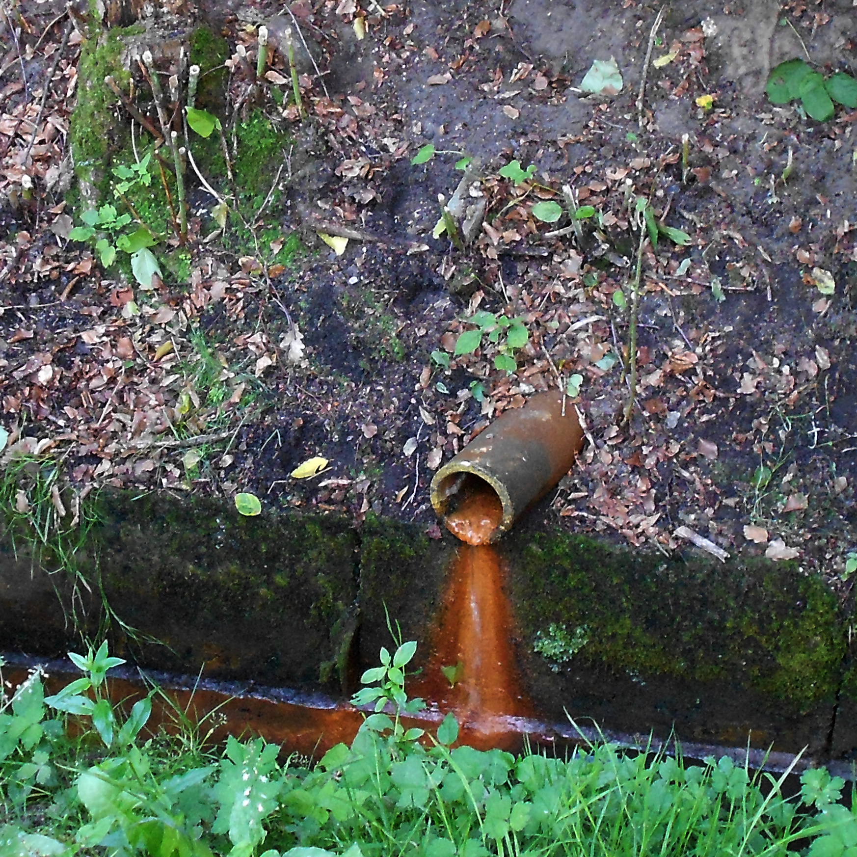 Fachklinik und Moorbad Bad Freienwalde